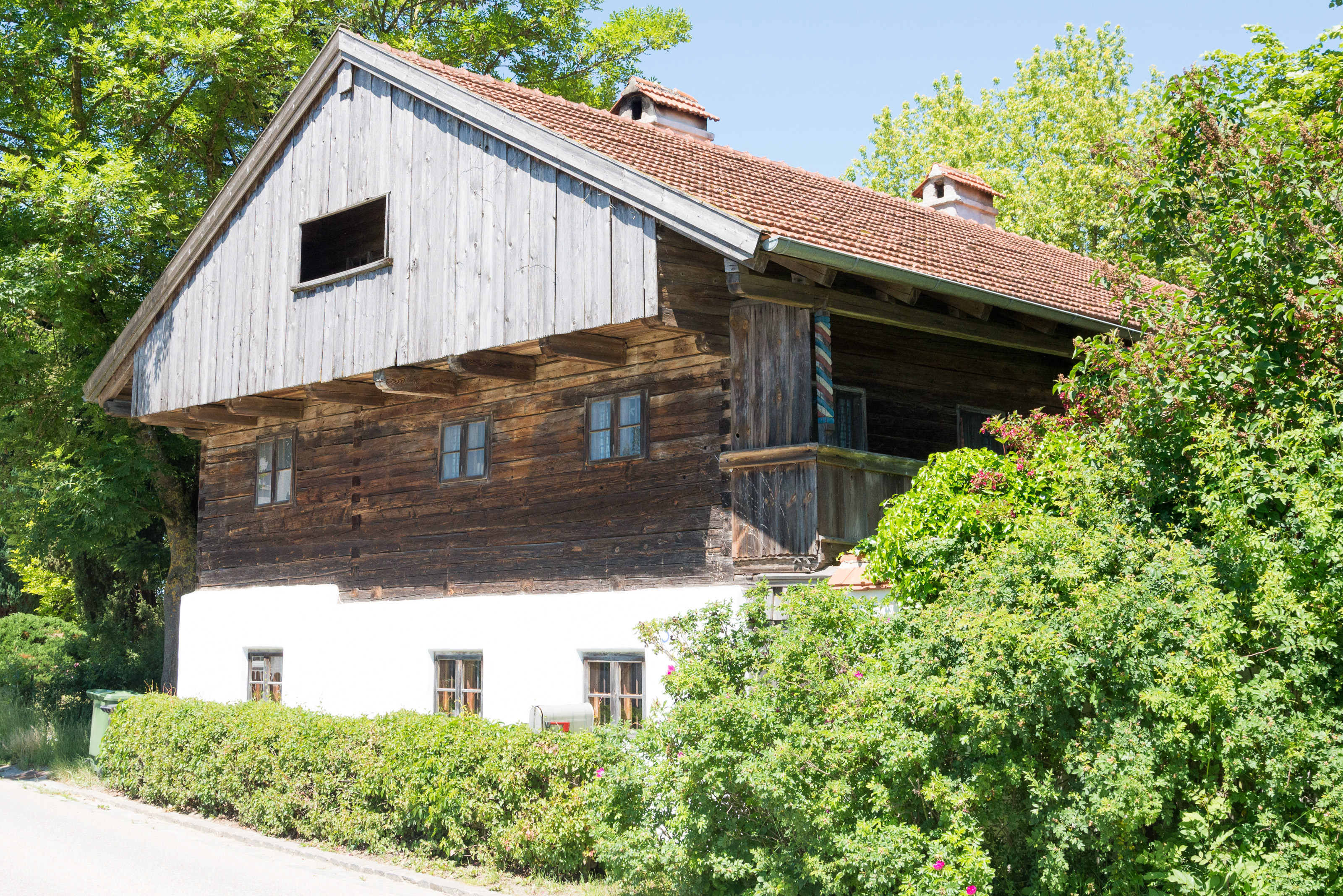 Bauernhaus eines Dreiseithofs mit Stadel: zweigeschossiger Satteldachbau, teilverschalter Blockbau mit Trauf- und Giebelschrot, 18./19. Jahrhundert. This is a photograph of an architectural monument.